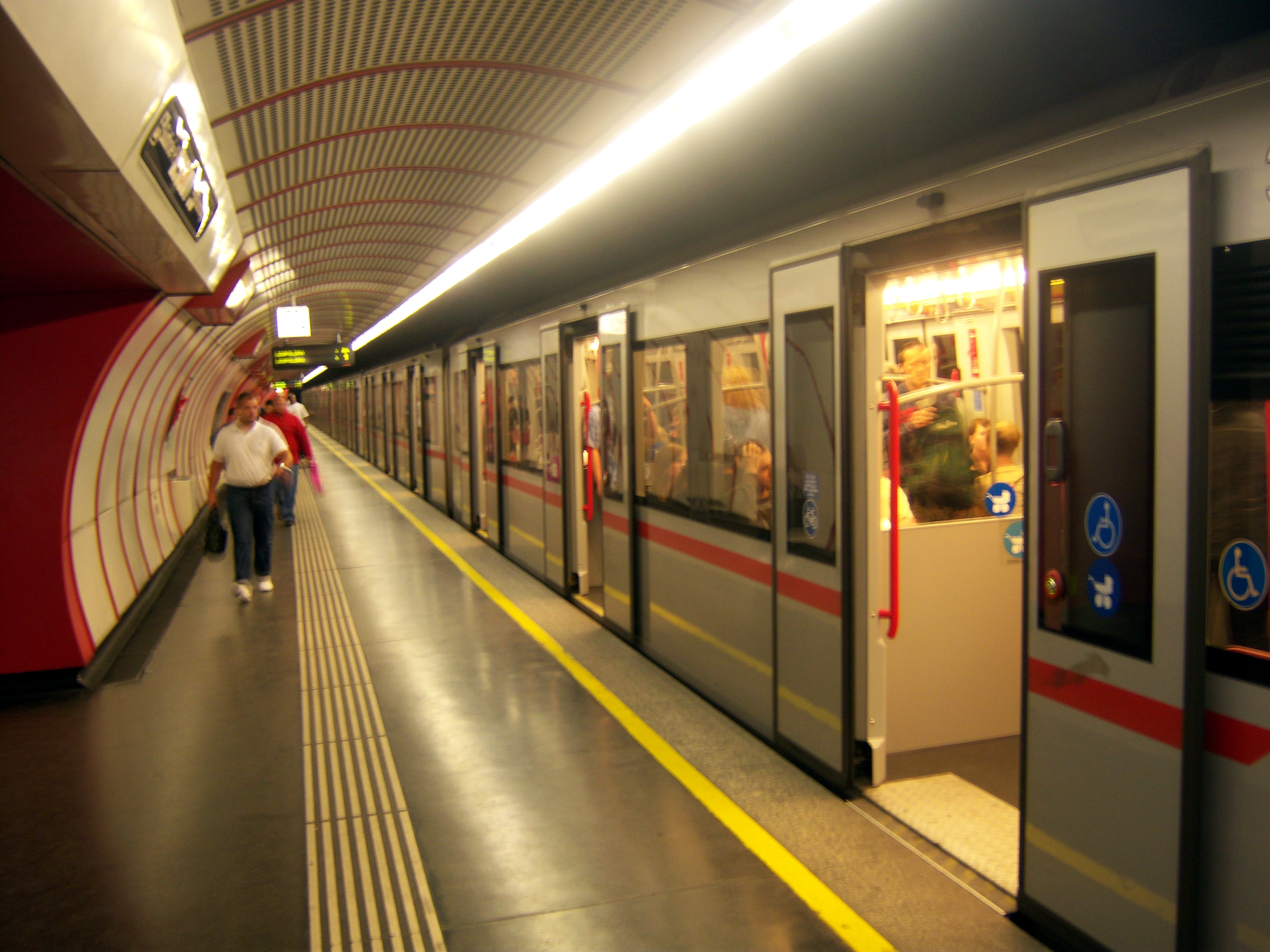 U-Bahn-Station Südtiroler Platz